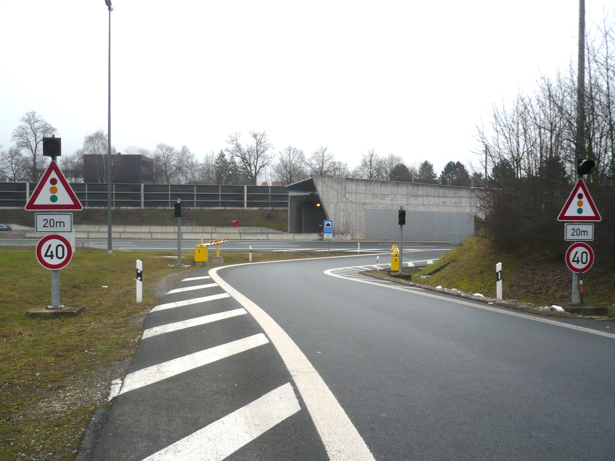 Anschlusstelle Bayreuth Nord der Bundesautobahn 9